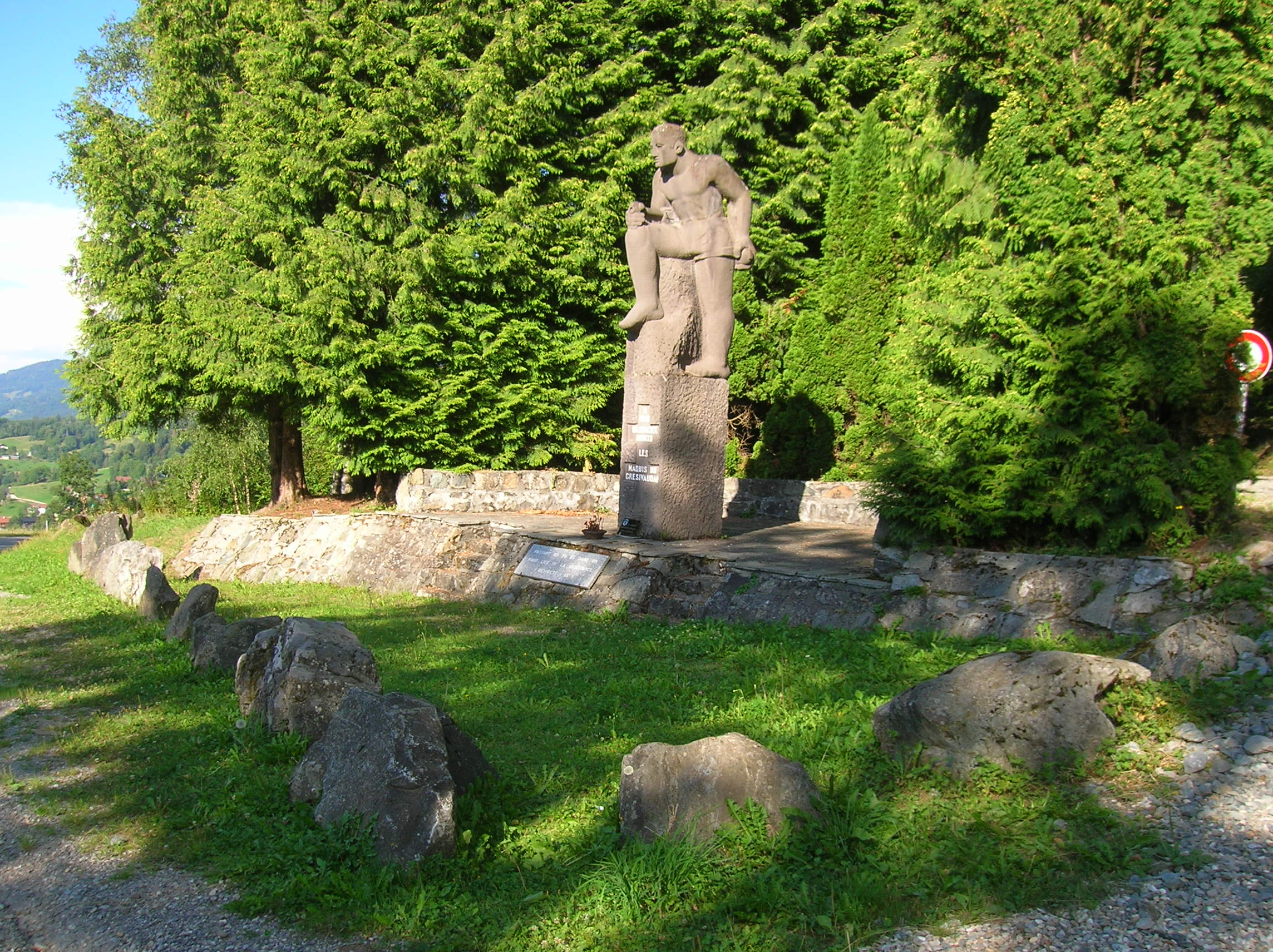 Monument du Maquisard aux Adrets, Isère, AuRA, France.